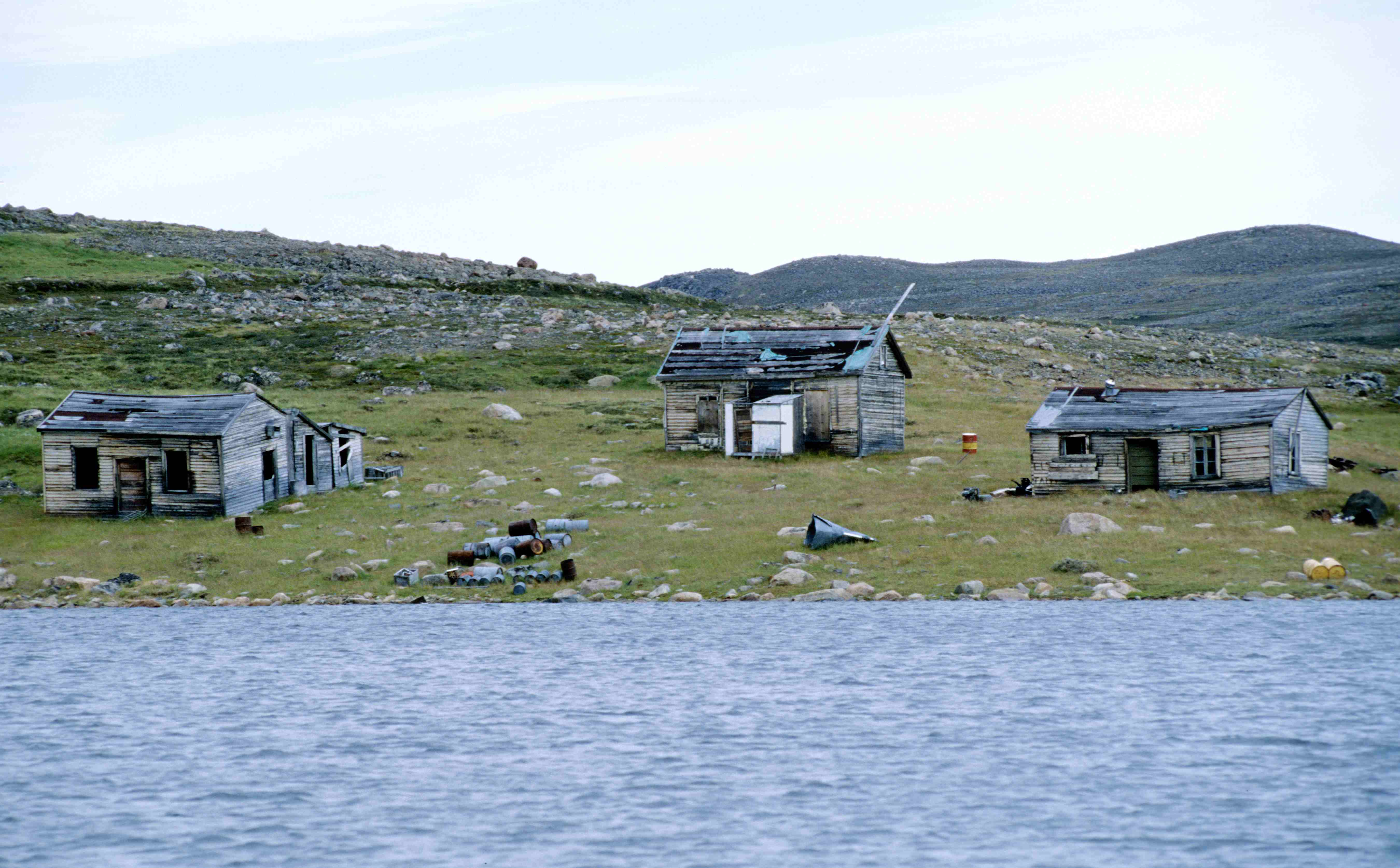 Abandoned HBC Post at Ford Lake (Ukkusiksalik National Park, Nunavut, Canada)